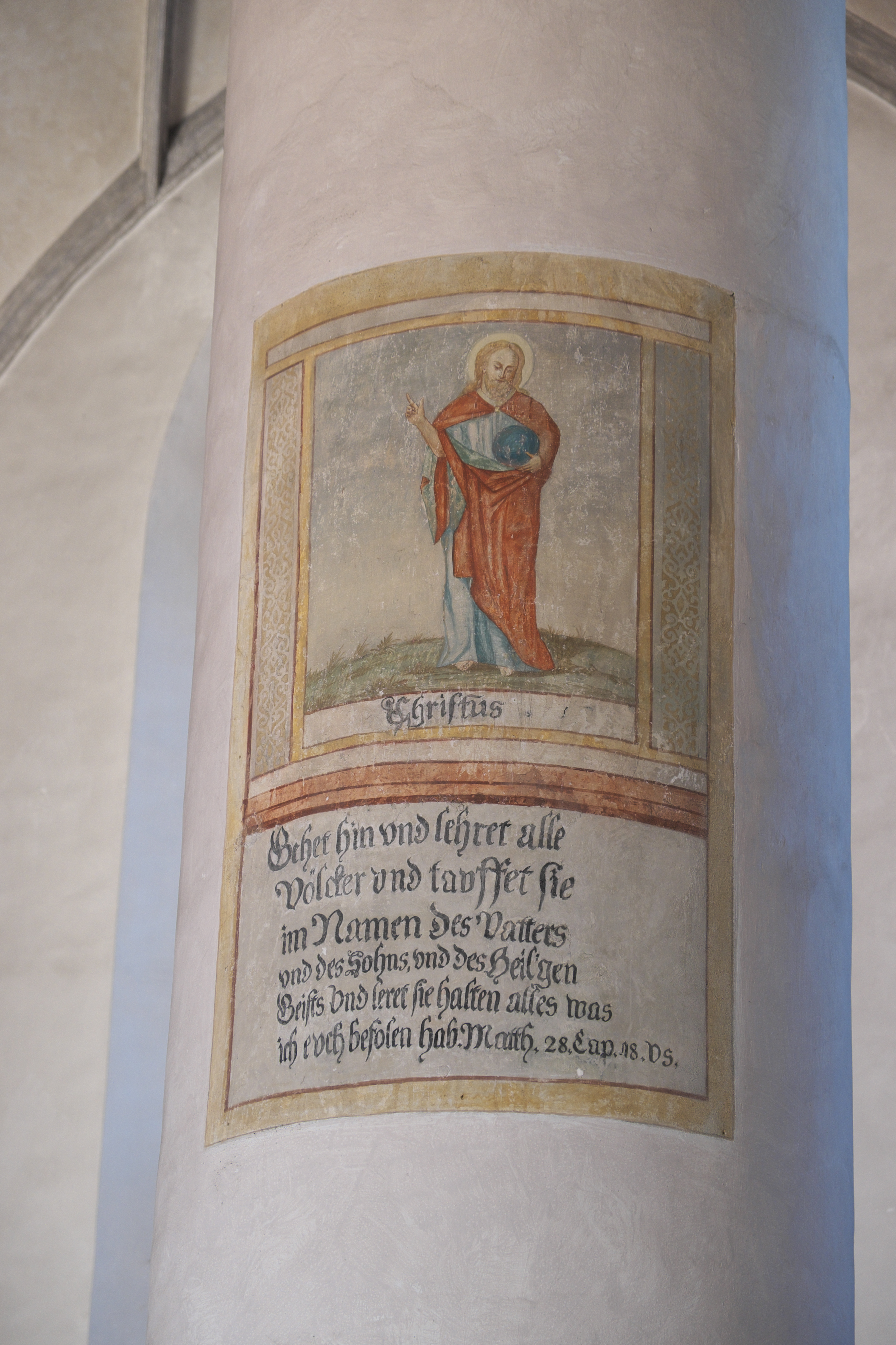 Katholische Stadtpfarrkirche Mariä Himmelfahrt in Höchstädt im Landkreis Dillingen an der Donau (Bayern), Säule mit Wandmalerei, um 1600, Darstellung: Christus mit Weltkugel